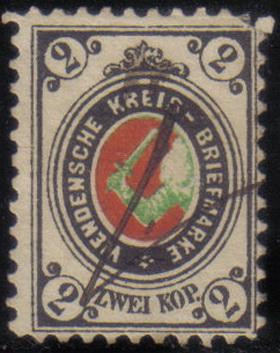 Почтовая марка Венденской местной почты десятого выпуска